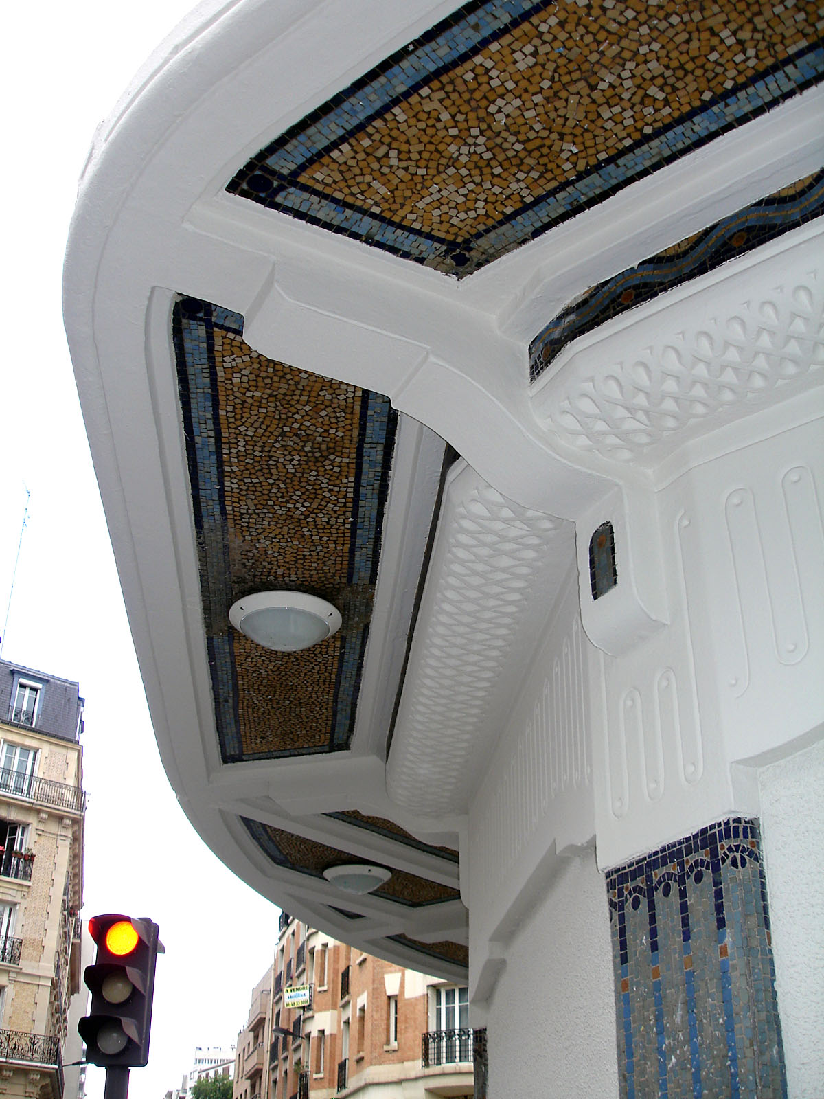 Édicule de la station Saint-Fargeau de la ligne 3 bis du métro de Paris, France.